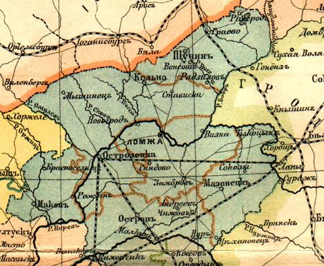 Ломжинская губерния в 1896 году